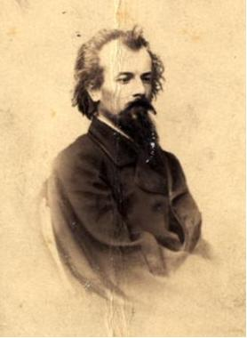 Портрет Николая Смёновича Шустова (1834-1868). Фотография.